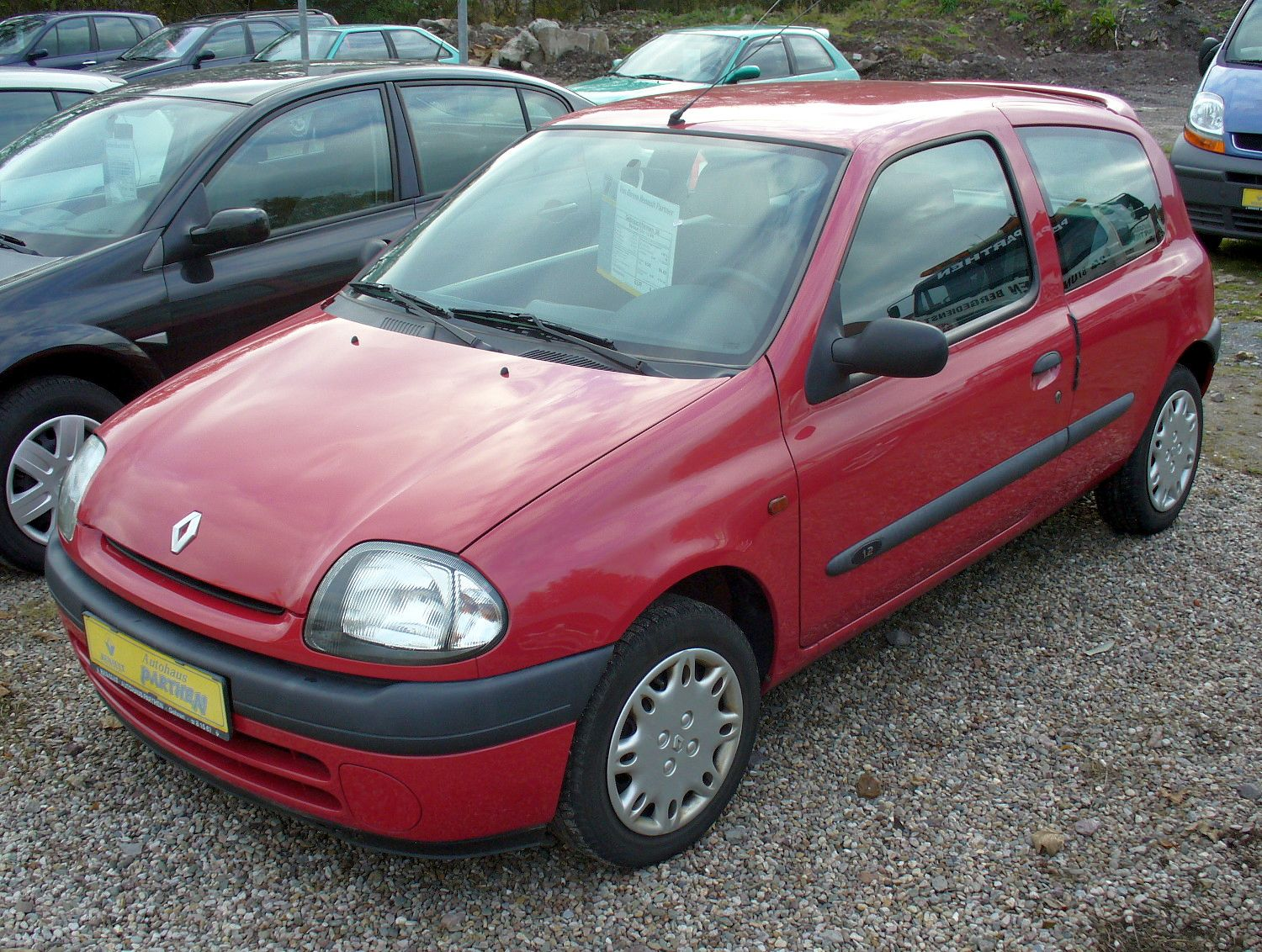 Renault Clio II